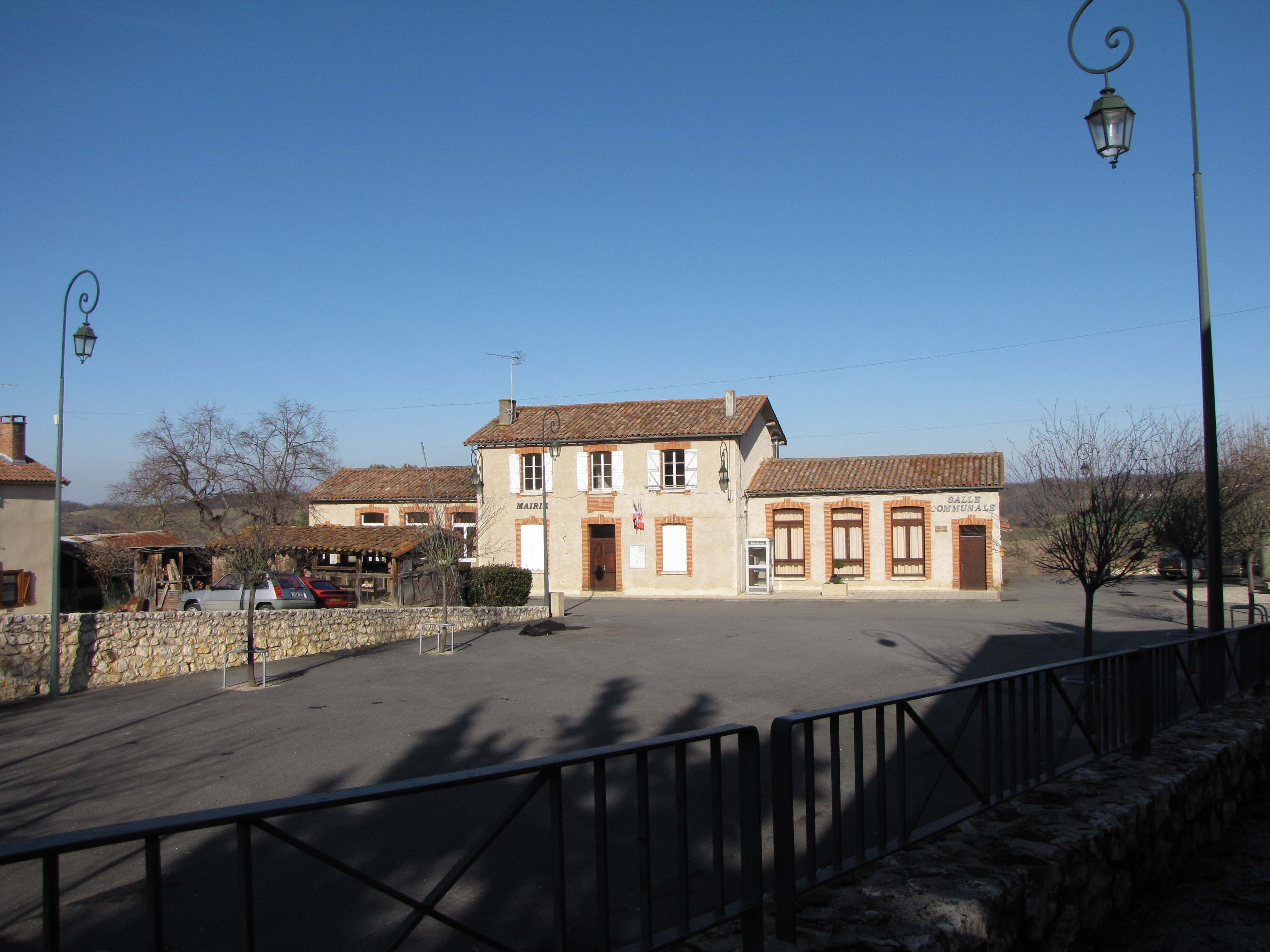 Mairie de Montberaud